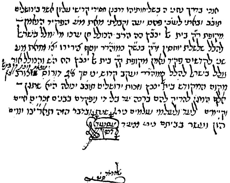 כתב ידו וחתימתו של רבי מסעוד הכהן אלחדאד